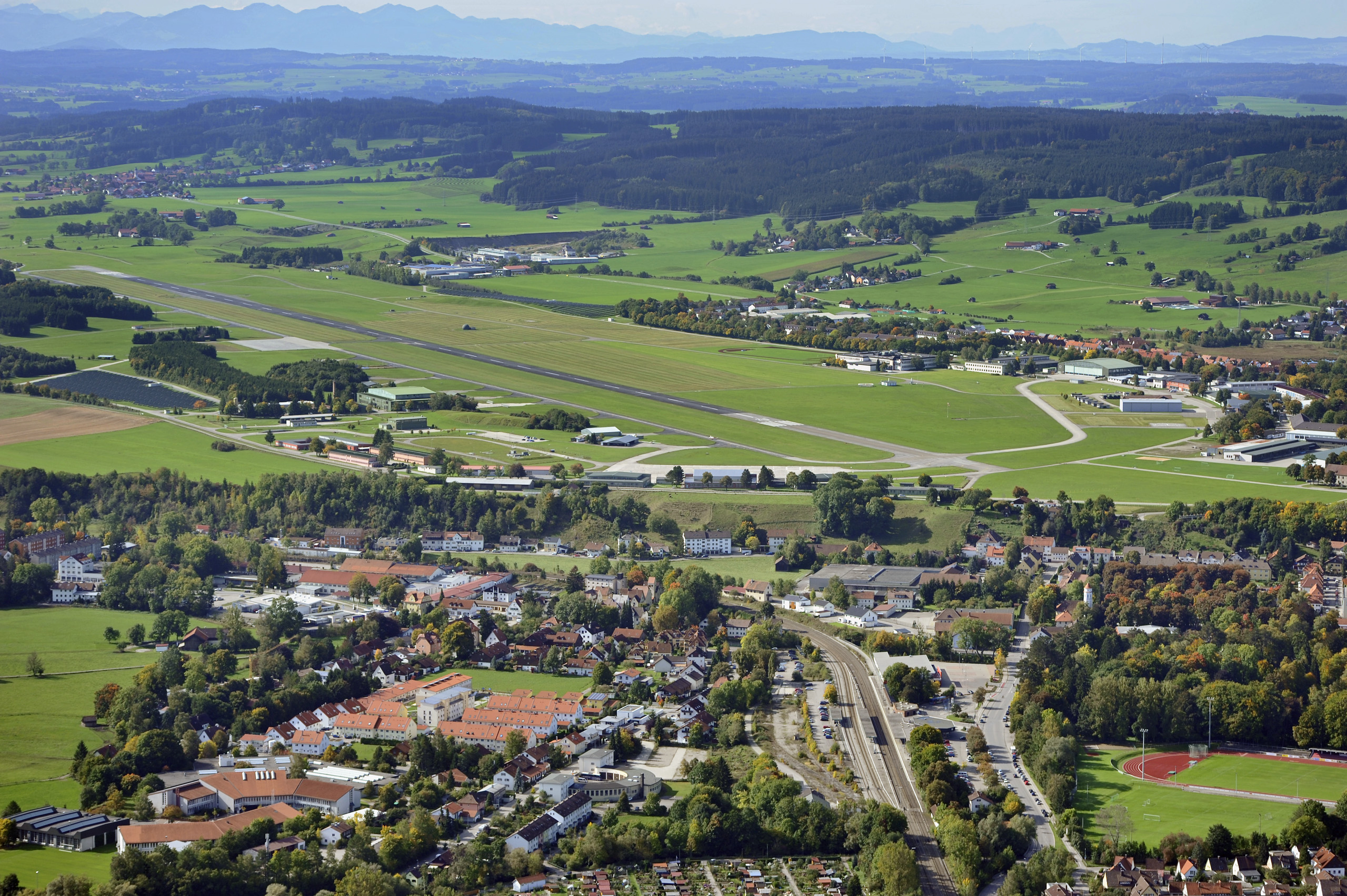 Kaufbeuren, Fliegerhorst und Bahnhof